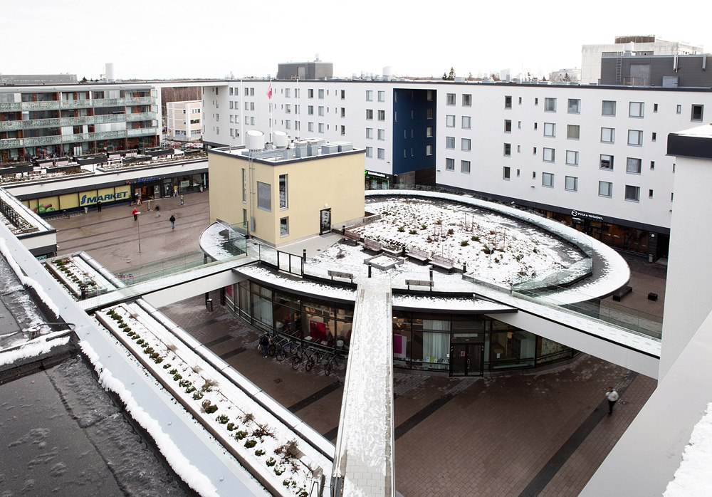 Myllypuron mediakirjasto Myllypuron Ostarin paviljonkirakennuksessa